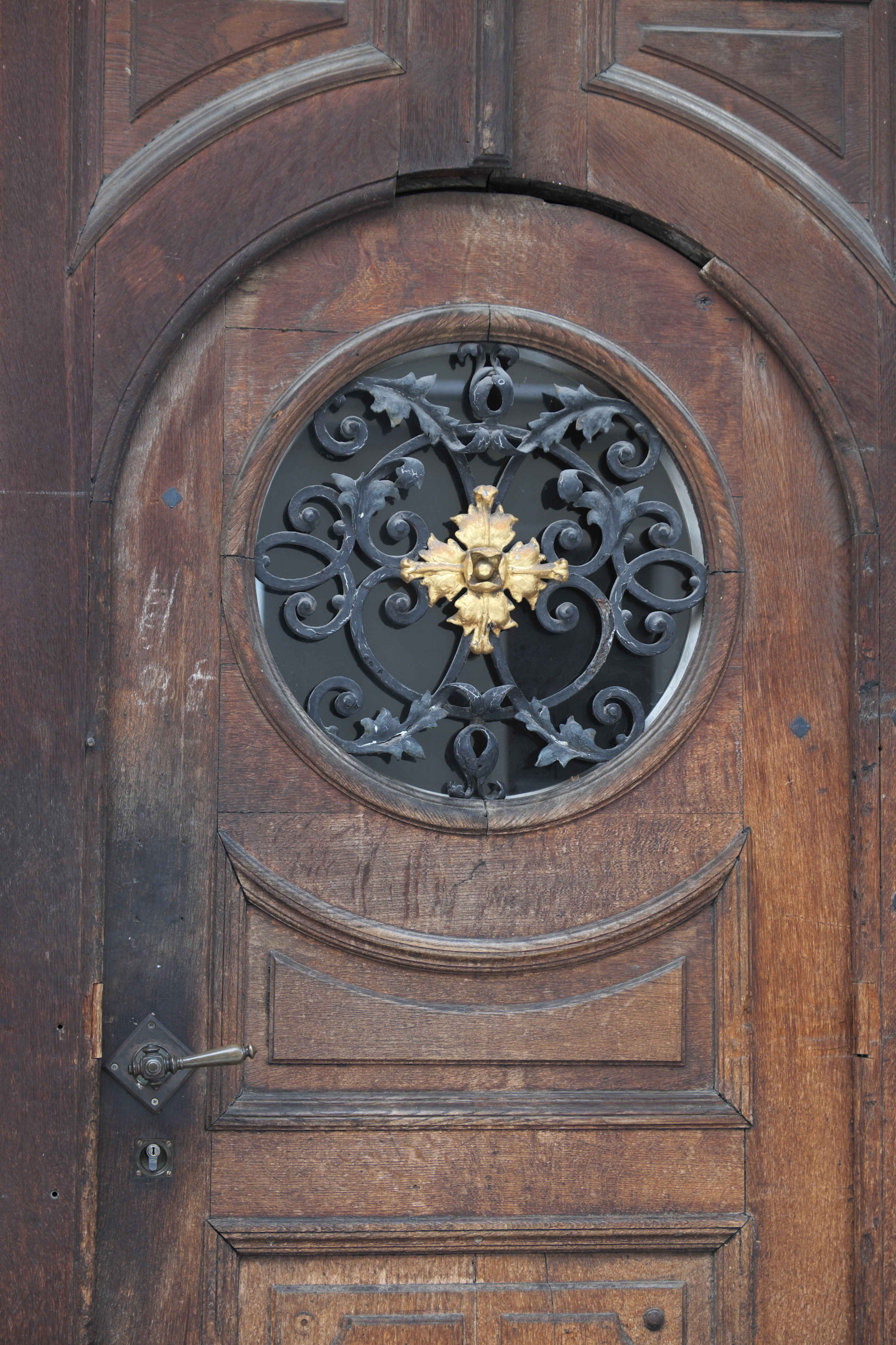 Mietshaus in der Breisacher Straße 7 in Haidhausen im Stadtbezirk Au-Haidhausen in München (Bayern/Deutschland), Haustür